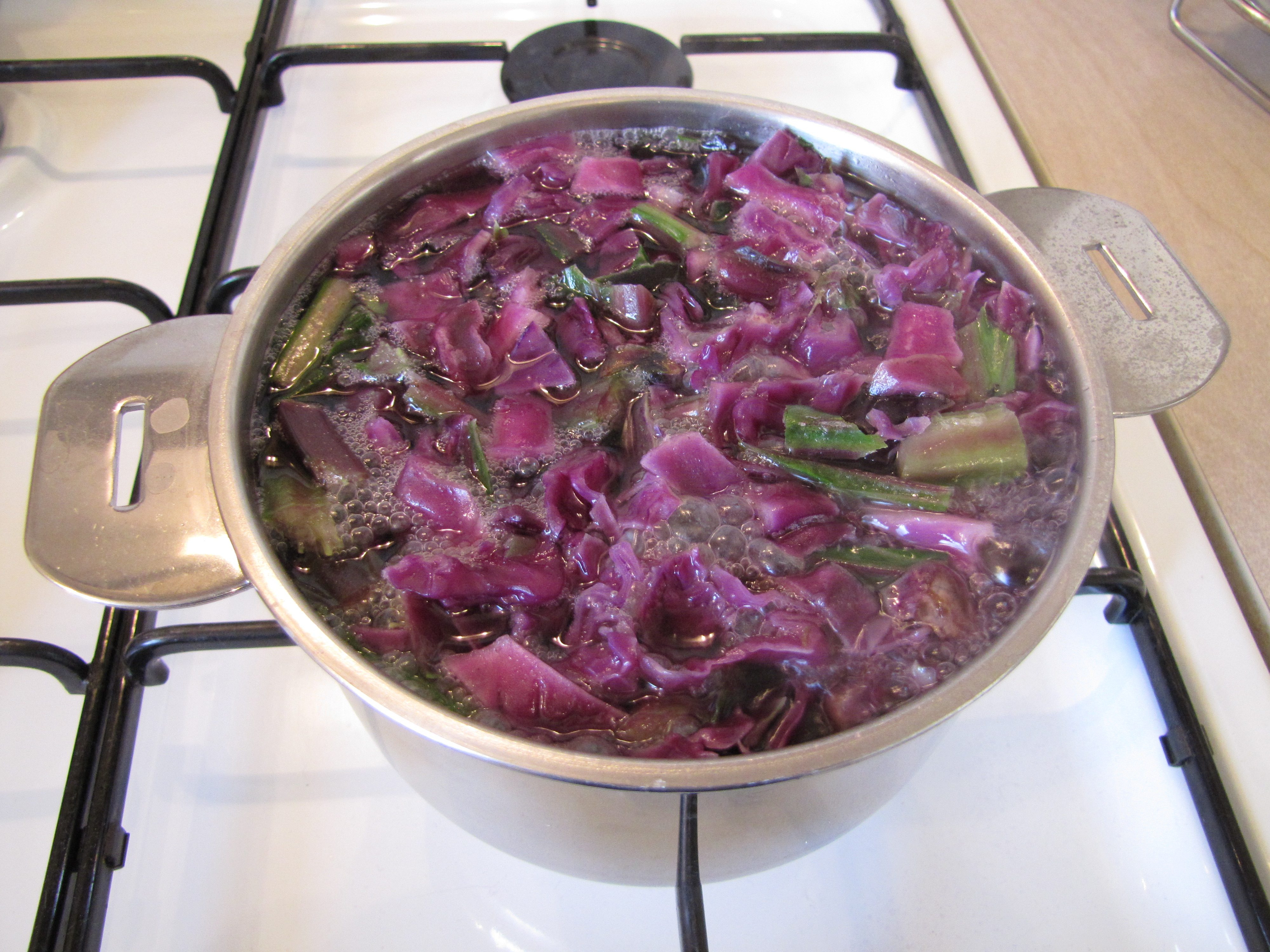 Chou rouge quelques minutes dans de l'eau de pluie bouillante.